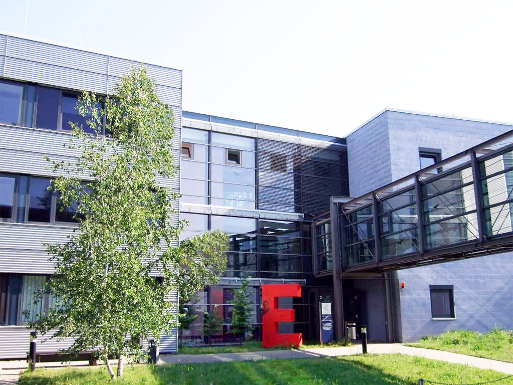 Das Max-Planck Institut für Gravitationsphsik (Albert-Einstein-Institut) in Potsdam-Golm.